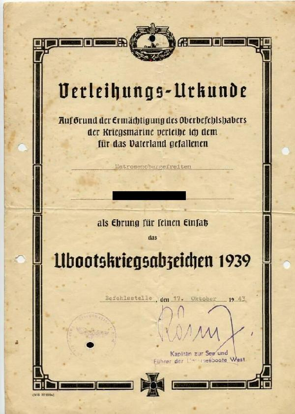 Scansione personale